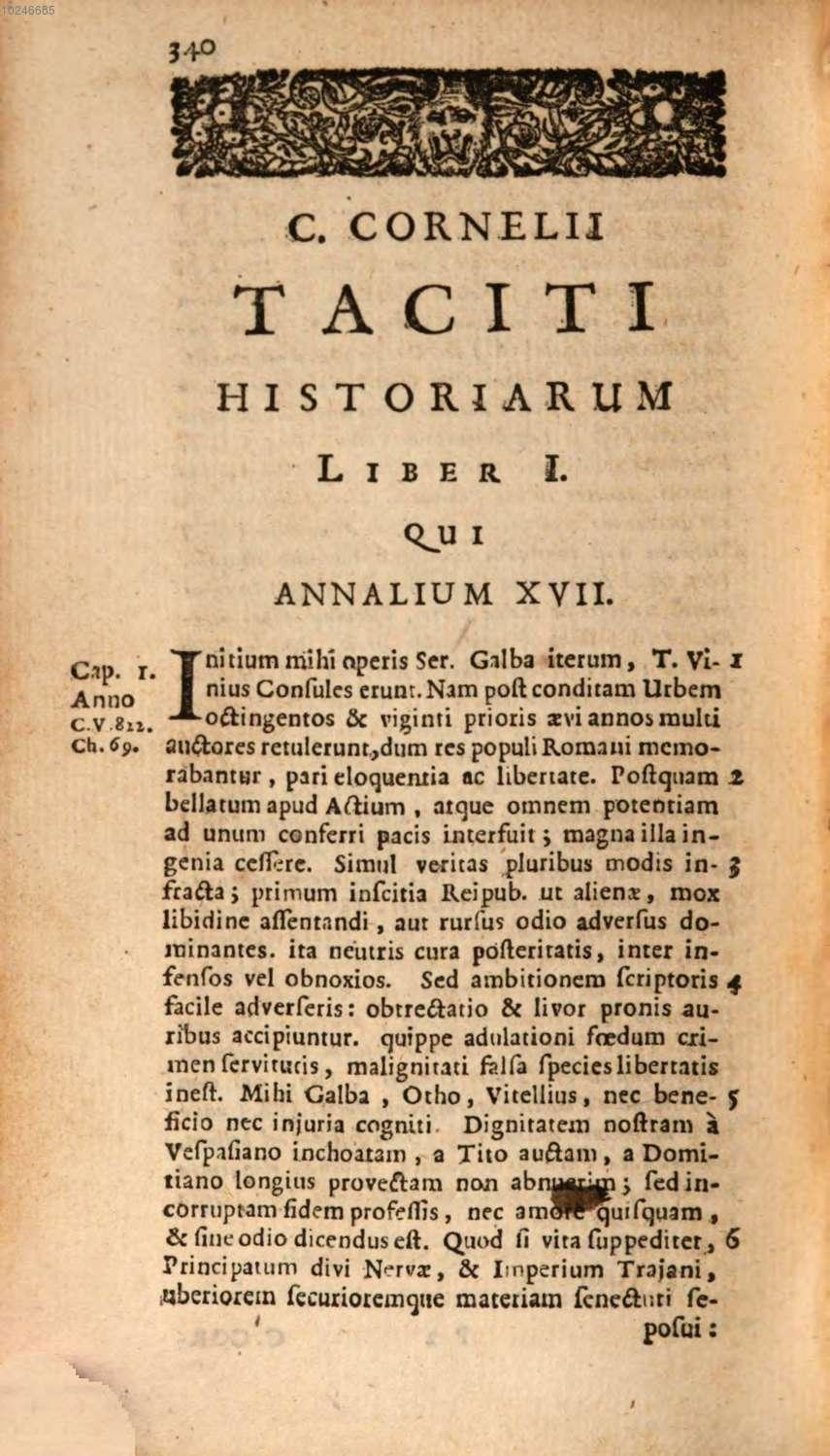 Tacitus Historien erste Seite der Edition durch Johannes Theodor Ryck, Leiden 1687